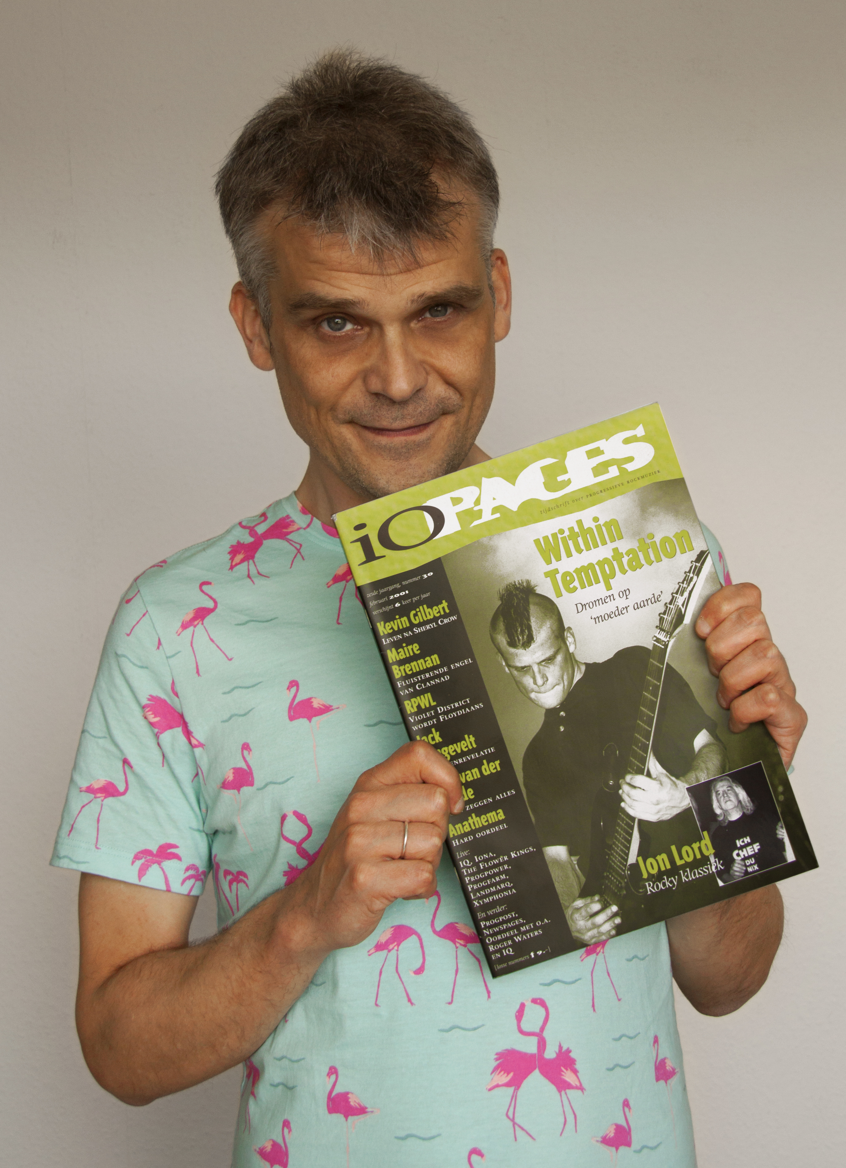 Michiel Papenhove